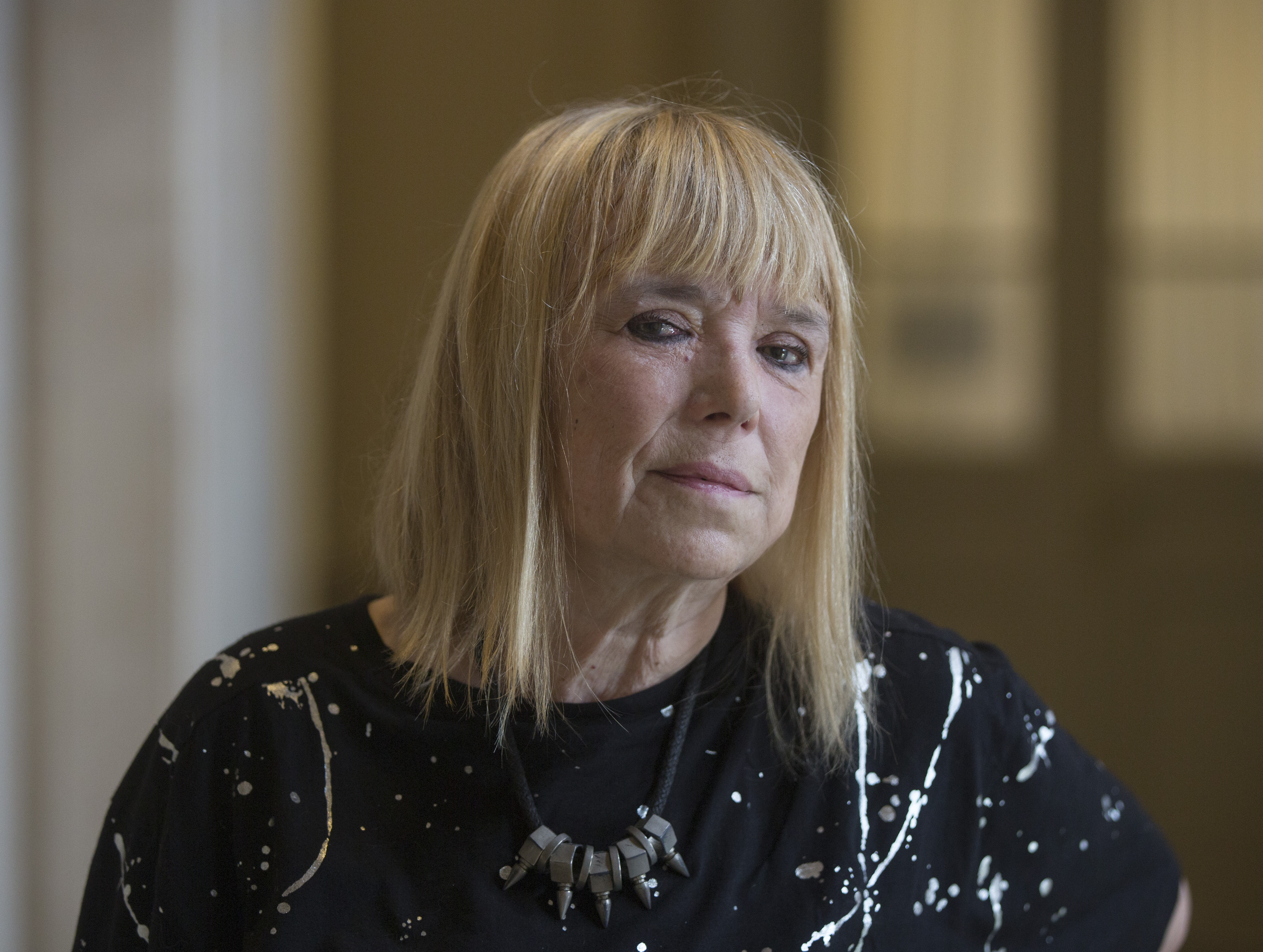 Retrato de María Moreno, directora del Museo del Libro y de la Lengua (Argentina). Buenos Aires, 21 de enero de 2020.